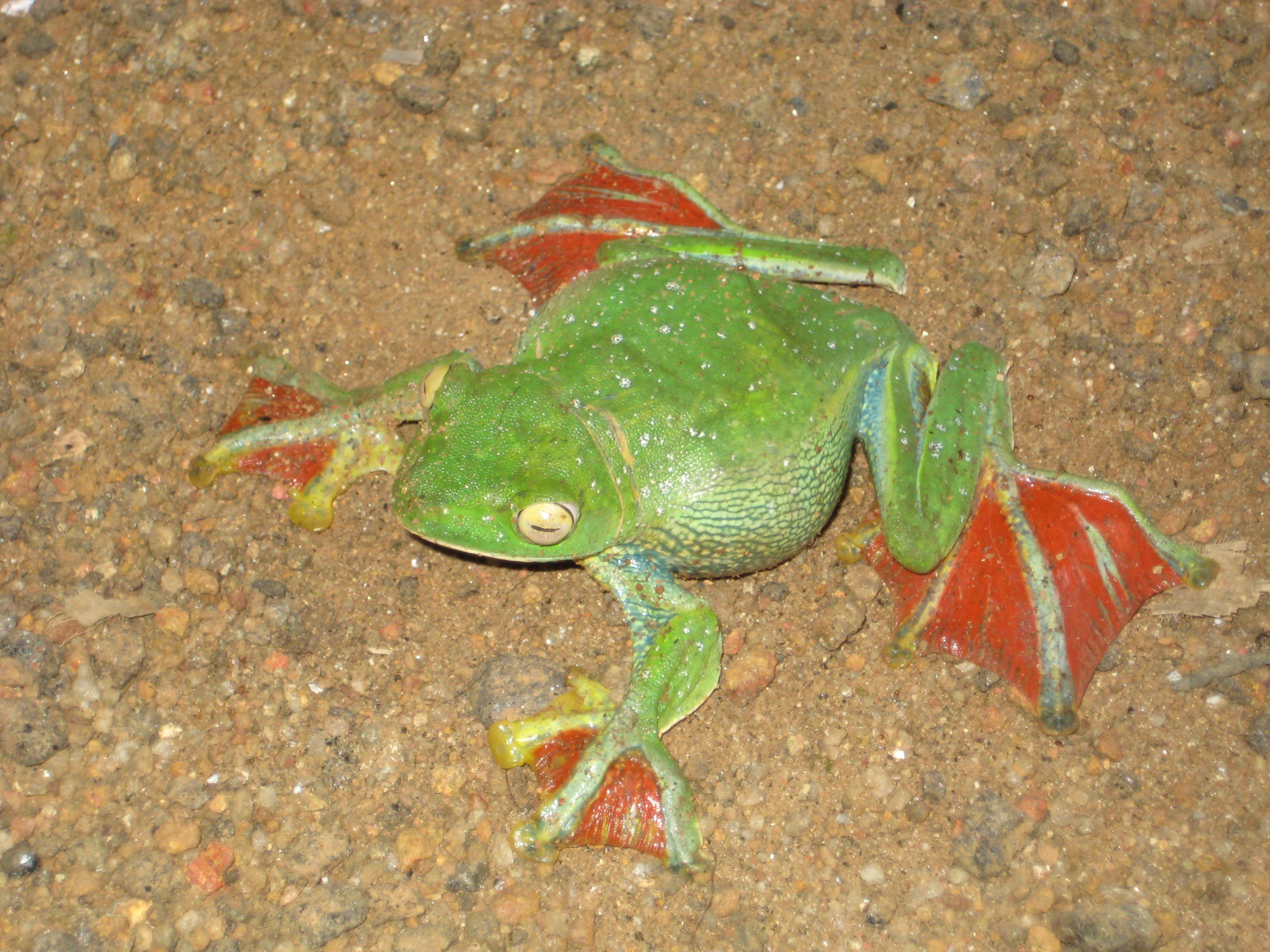 ഇളിത്തേമ്പൻ തവള അഥവാ പച്ചിലപ്പാറൻ (Malabar Flying Frog - Rhacophorus malabaricus) തവള ഒരു ഉഭയ ജീവിയാണ്. കരയിലും വെള്ളത്തിലും ജീവിക്കുന്ന ജീവികളെയാണ് ഉഭയജീവികൾ എന്നു വിളിക്കുന്നത്. വൃക്ഷങ്ങളിലും മാളങ്ങളിലും കുഴികളിലും ജീവിക്കുന്നവ ഉൾപ്പെടെ മൂവായിരത്തോളം സ്പീഷീസ് തവളകളെ കണ്ടെത്തിയിട്ടുണ്ട്. കേരളത്തിലും പലതരത്തിലുള്ള തവളകളെ കണ്ടുവരുന്നു. ഇതിന്റെ കൂടെ ചേർത്തിരിക്കുന്ന പച്ച തവളയുടെ കാല്പാദങ്ങളിൽ ചുവന്ന ചർമ്മം കാണുന്നുണ്ട്. തട്ടേക്കാട്, ഭൂതത്താൻകെട്ട് അണക്കെട്ടിന്റെ ഉൾപ്രദേശത്തുനിന്നുമാണ് ഇവിടെ ചേർത്തിരിക്കുന്ന ഇളിത്തേമ്പൻ തവള /പച്ചിലപ്പാറൻ തവള കണ്ടത്